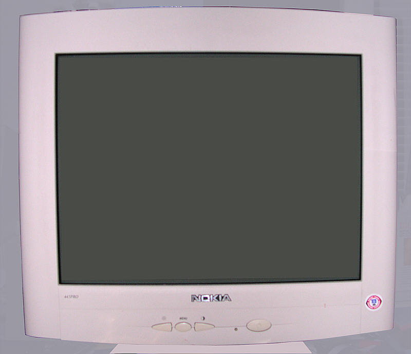 Nokia 445 PRO 21-Zoll Computermonitor